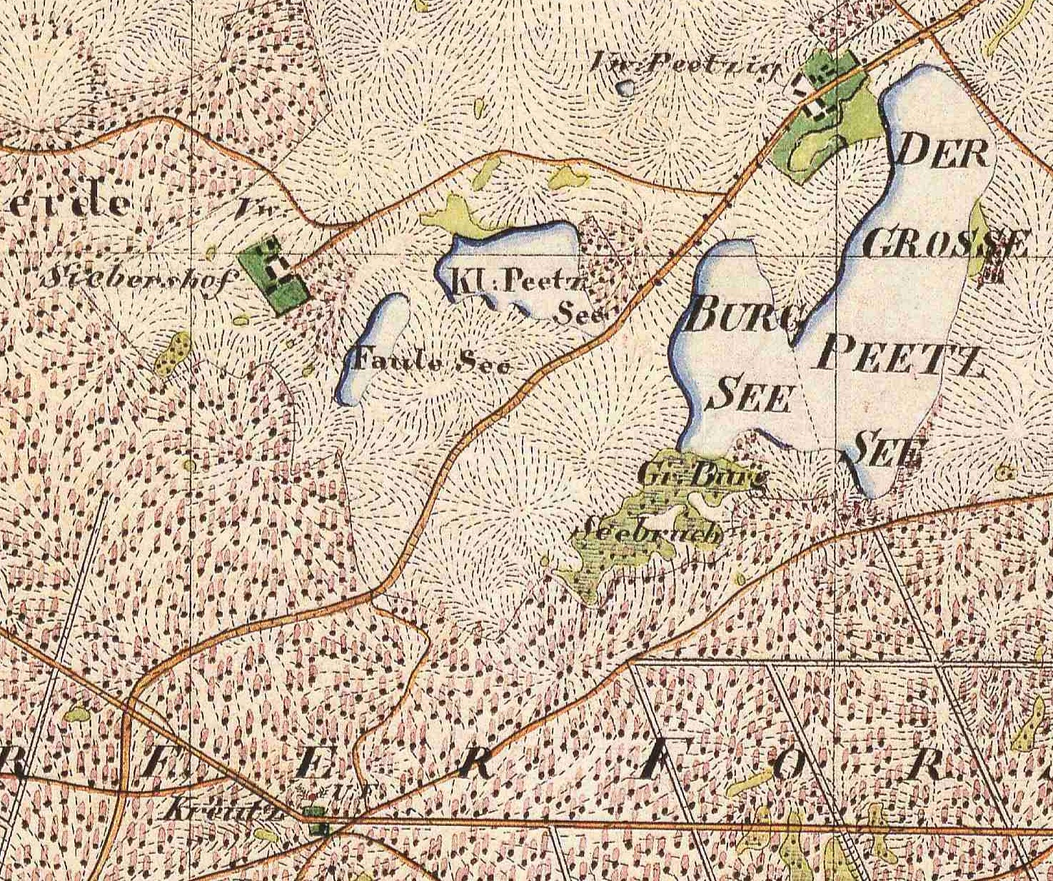 Die Wohnplätze Peetzig, Siebershof (abgeg.) und Kreuz (abgeg.). der Stadt Angermünde, Lkr. Uckermark, Ausschnitt aus dem Urmesstischblatt 2949 Greiffenberg von 1826